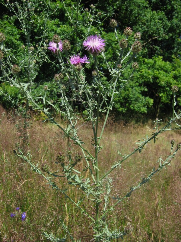 Rispen-Flockenblume Centaurea stoebe, Müritz-Gebiet